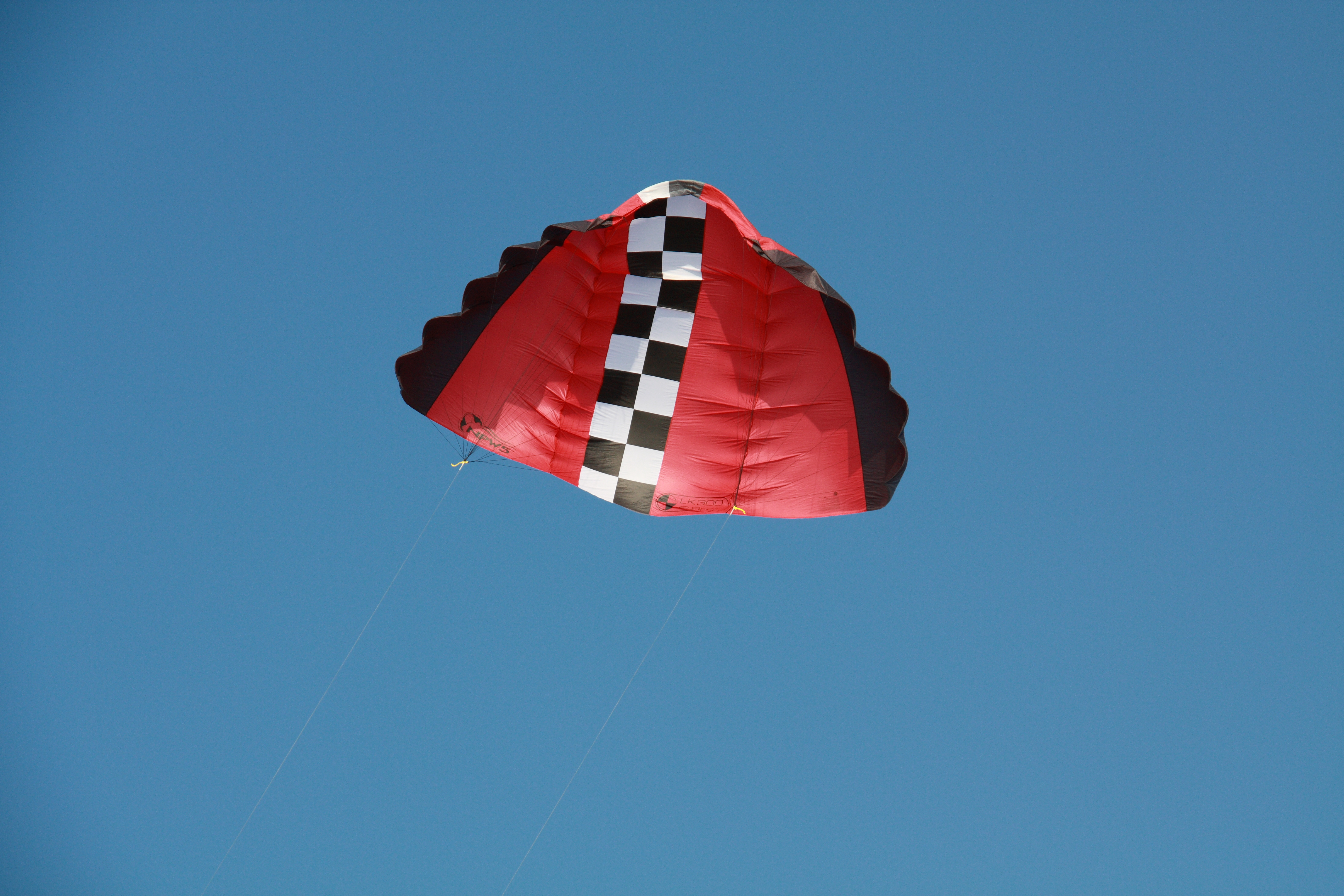 Vliegeren